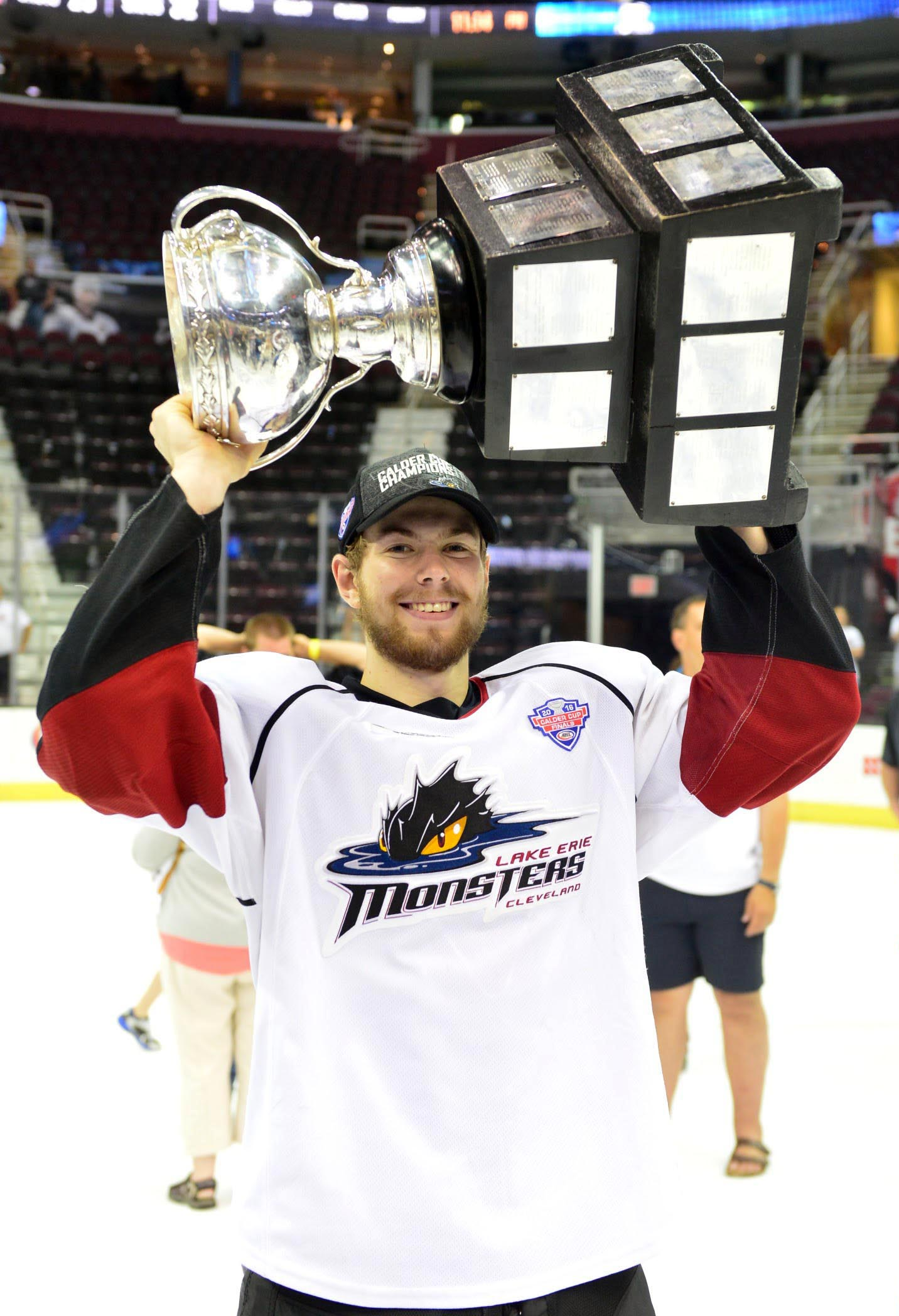 Photo: John Saraya/AHL